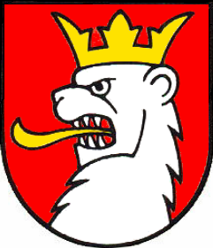 Wappen der politischen Gemeinde Augst, Schweiz